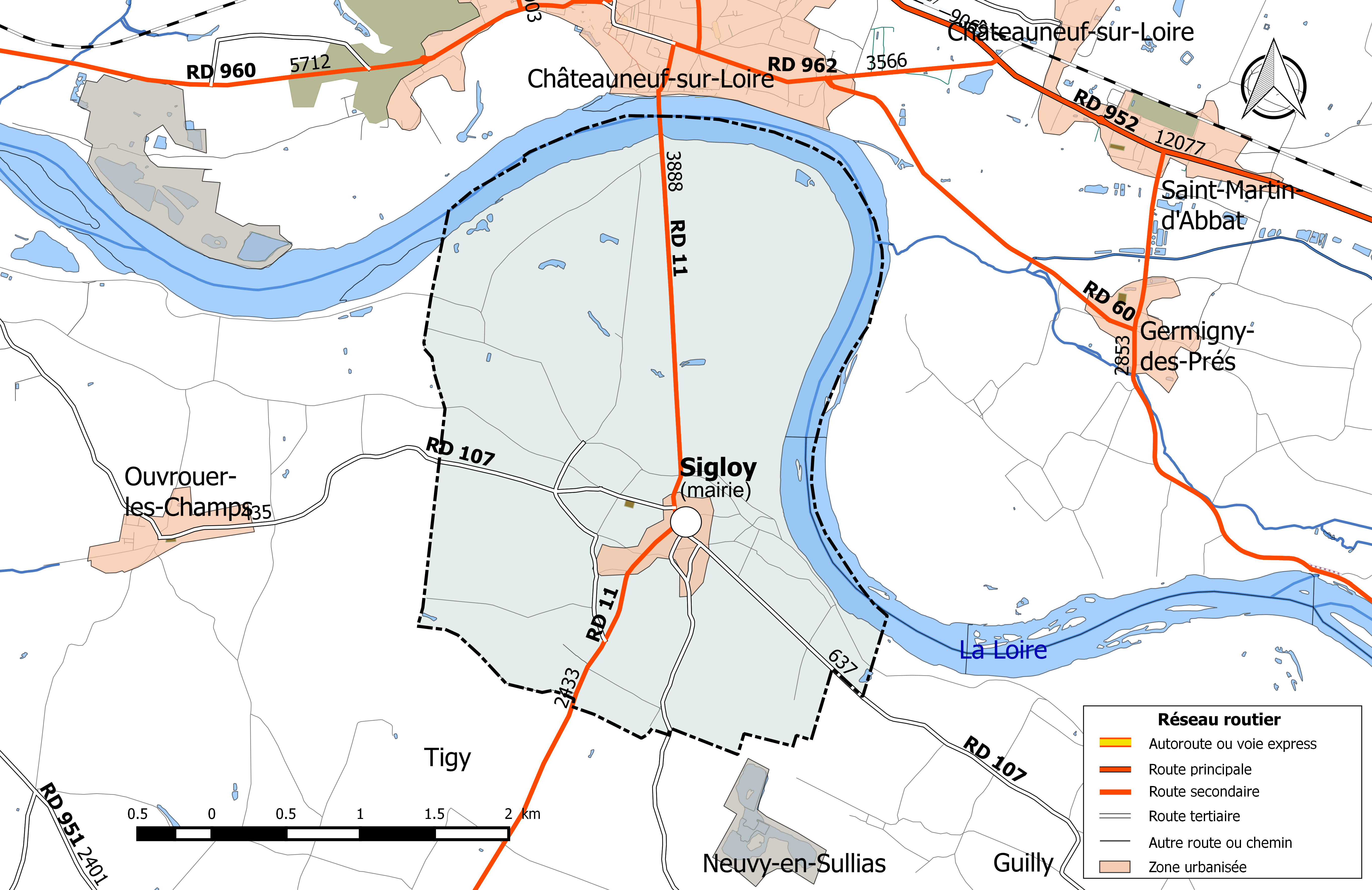 Carte du réseau routier de la commune de Sigloy.